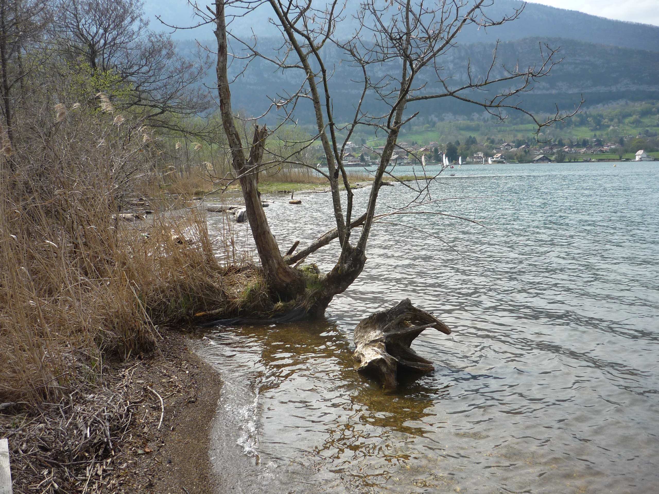 Réserve naturelle du Bout-du-Lac, Doussard, Haute-Savoie, France